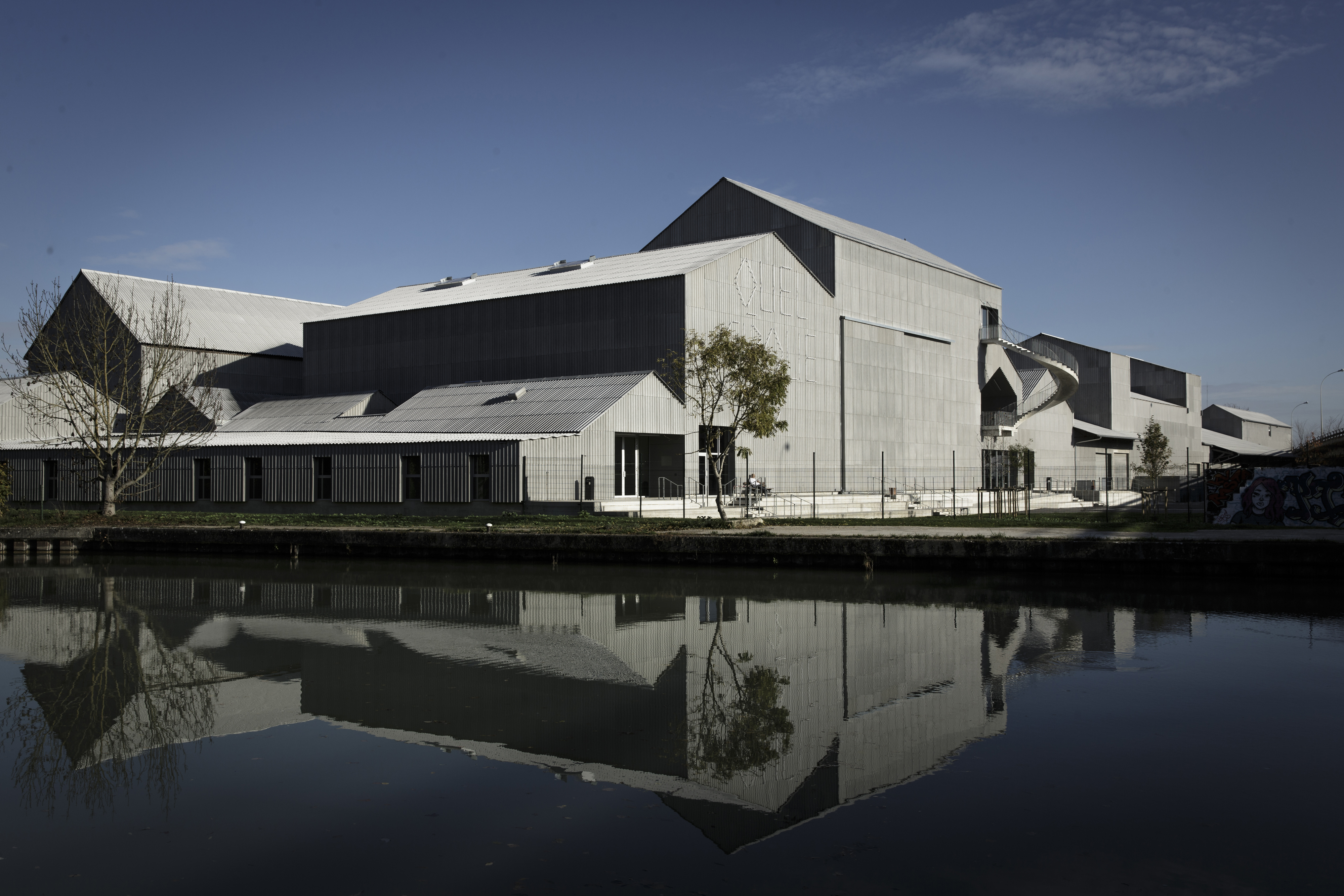 Nouveaux bâtiments du Centre national des arts du cirque / Cnac de Châlons-en-Champagne, dédiés aux enseignements circassiens, sur le site La Marnaise.